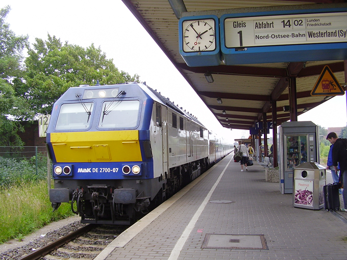 Nord-Ostsee-Bahn am Bahnhof Heide (Holstein) MaK DE 2700-07